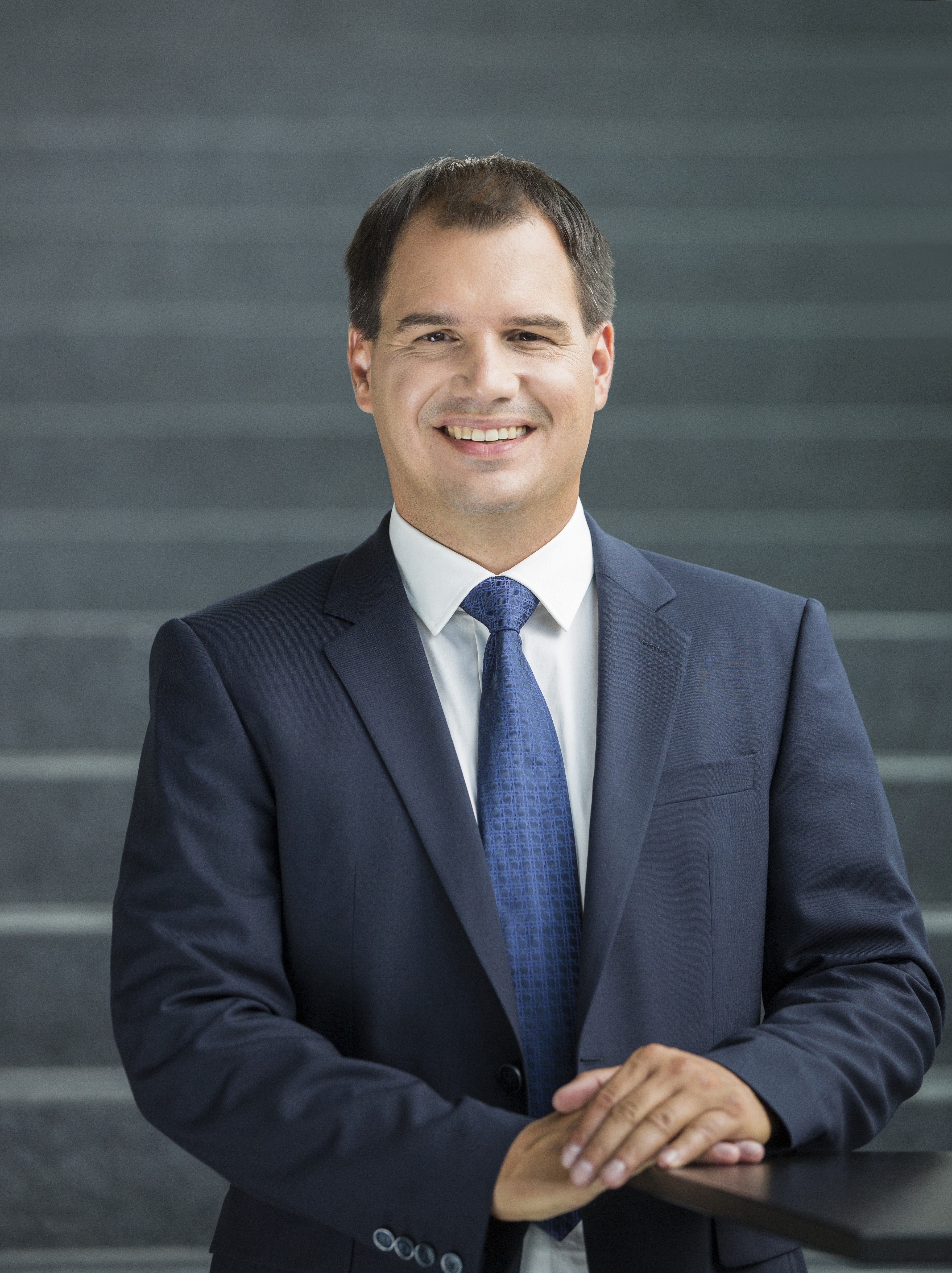 Michael Schickhofer (2017)